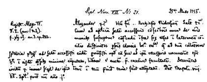 P. A. Munchs avskrift av et pavebrev.